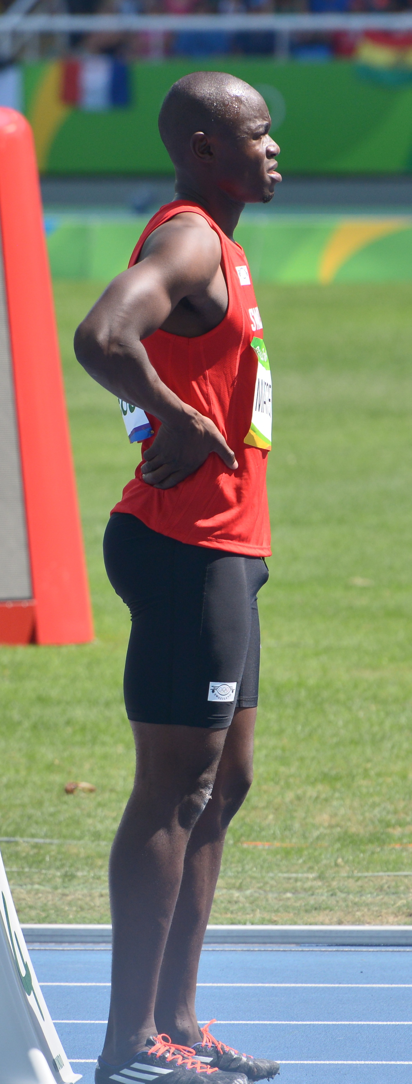 Séries du 200m Homme aux JO de Rio 2016